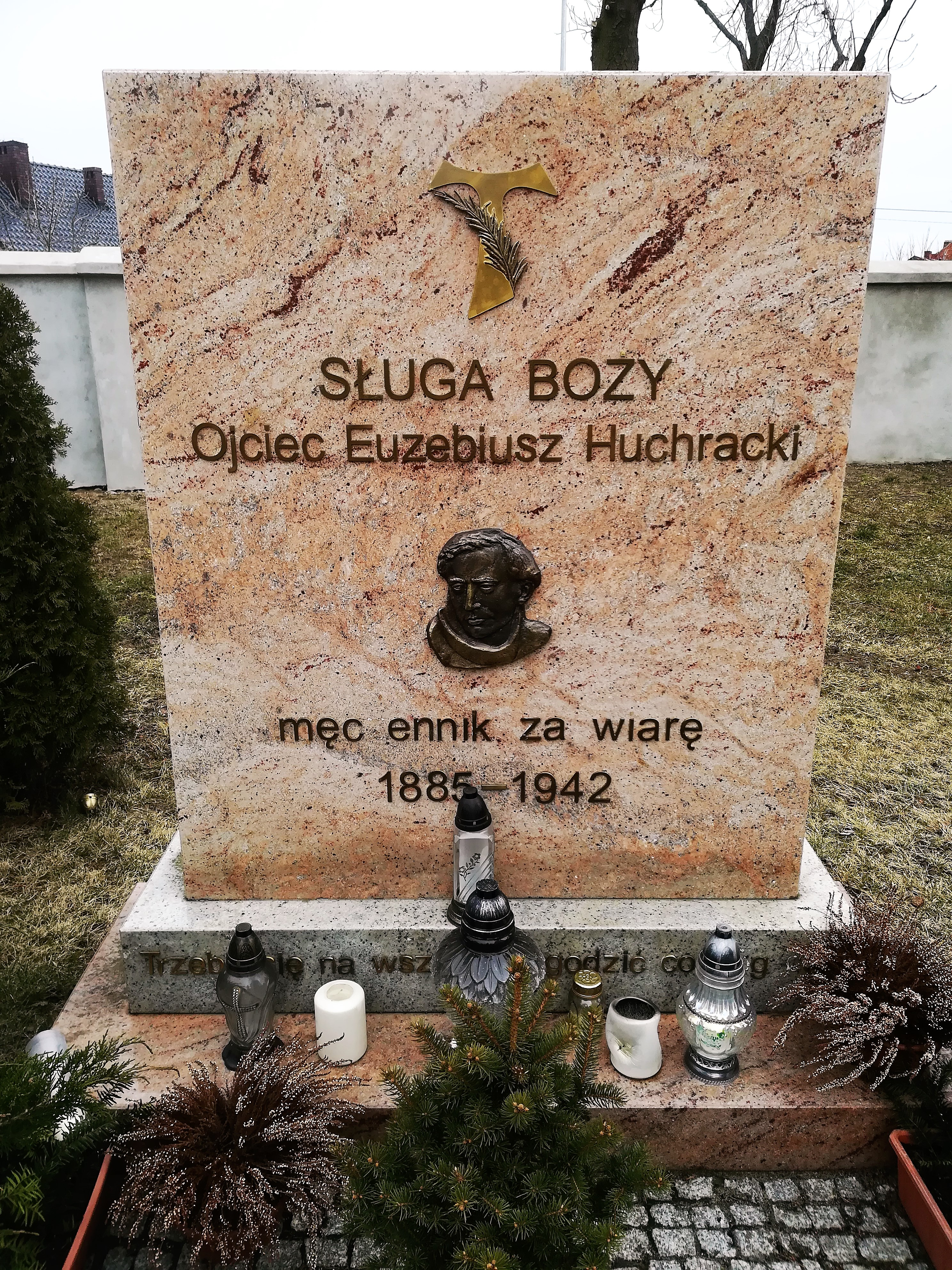 Kościół Franciszkanów - Goruszki (Karolinki).